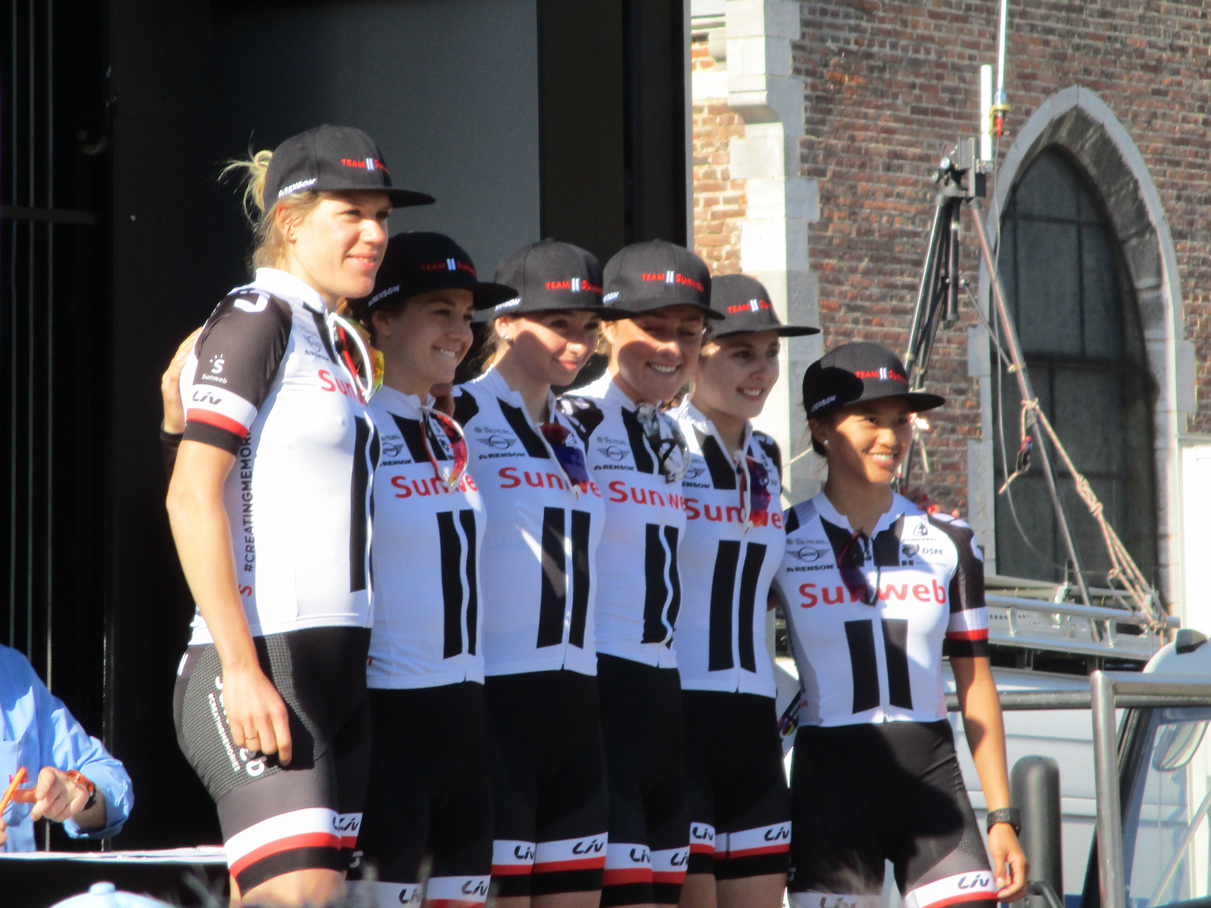 Start van de Waalse Pijl 2018 op de Mur van Huy.